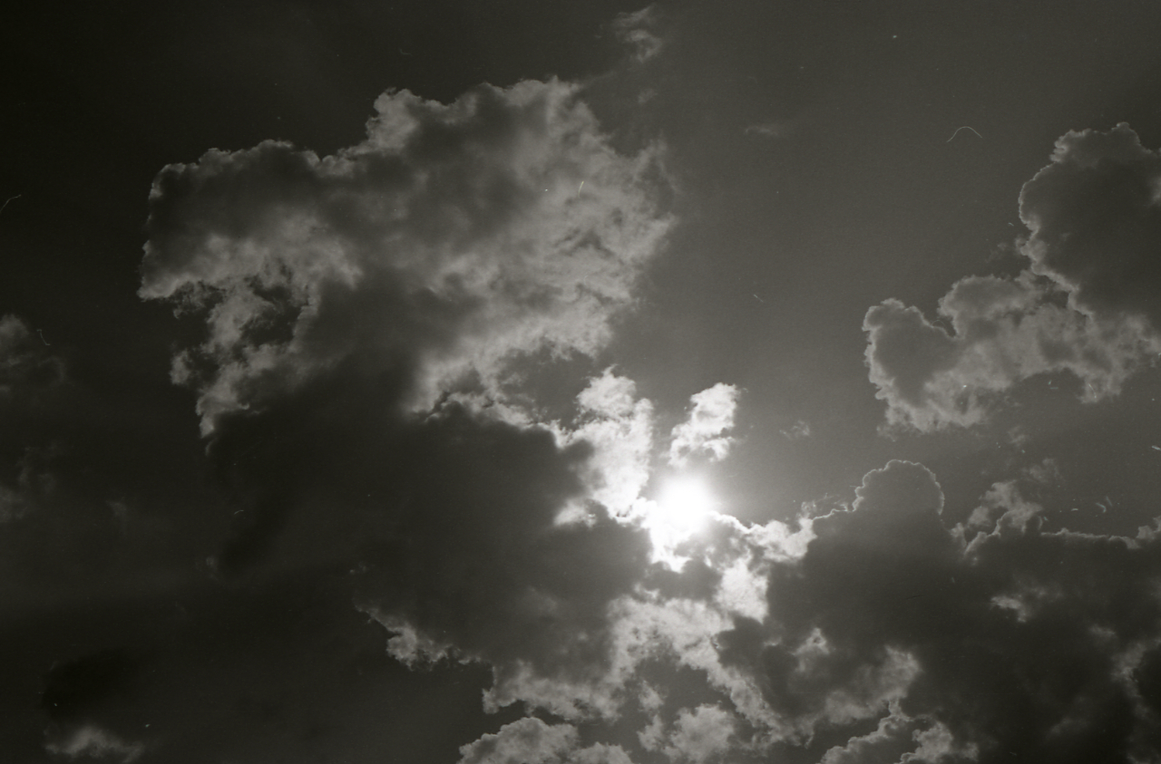 Serie fotografica : Anzola d'Ossola, 1967 / Paolo Monti. - Strisce: 7, Fotogrammi complessivi: 36 : Negativo b/n, gelatina bromuro d'argento/ pellicola ; 35 mm. - ((Sul portanegativi: [NIKMAT?] PanF.